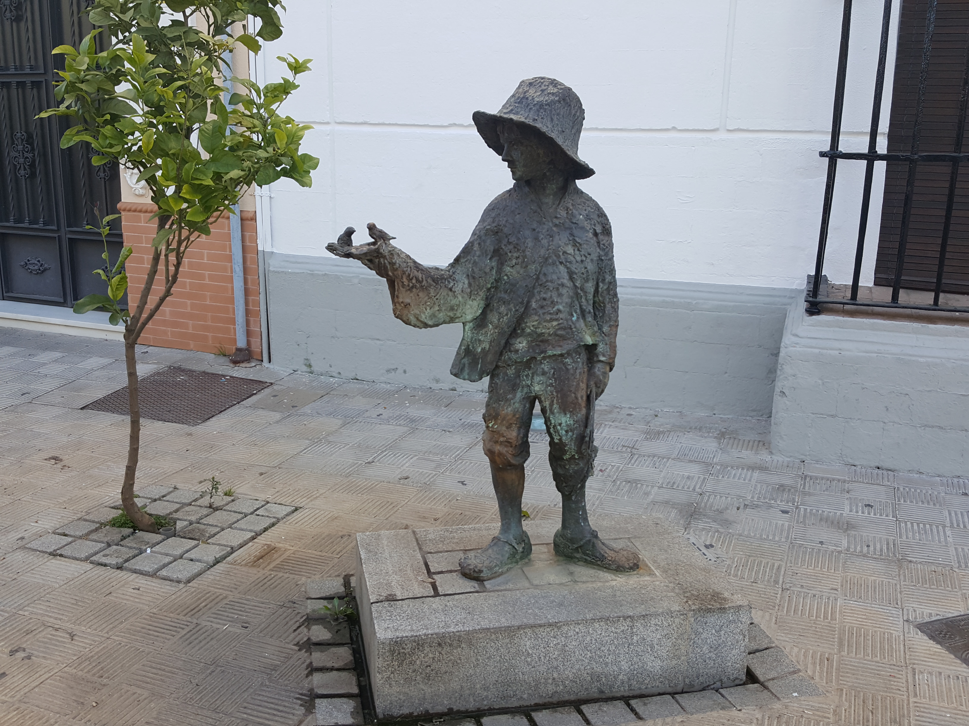 Escultura perteneciente al Museo al aire libre Moguer EScultura de Moguer, Andalucía (España). Escultura incluida en la serie PlateroEScultura con el nombre "El niño y el agua".